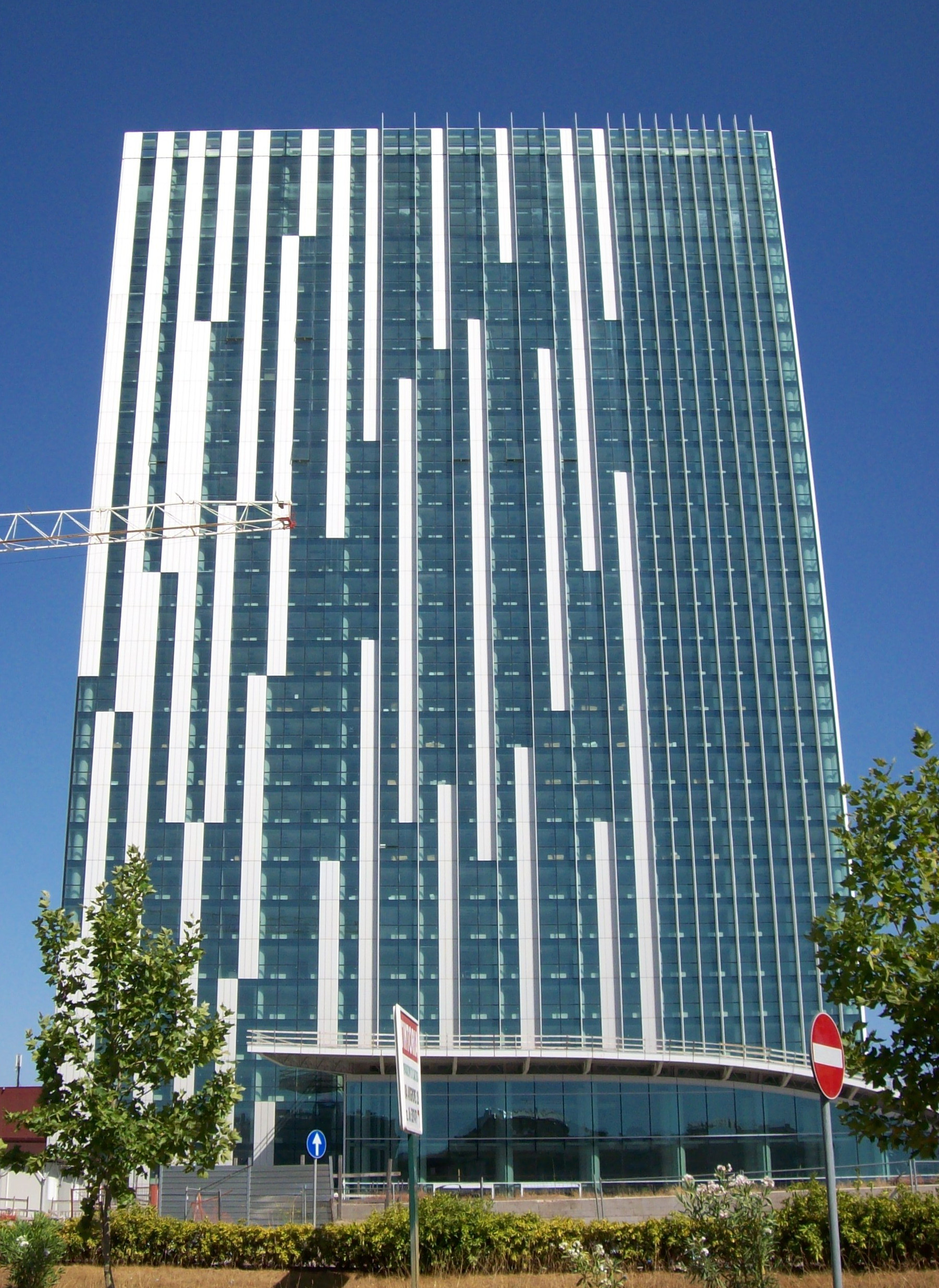 La Torre Europarco di Roma.